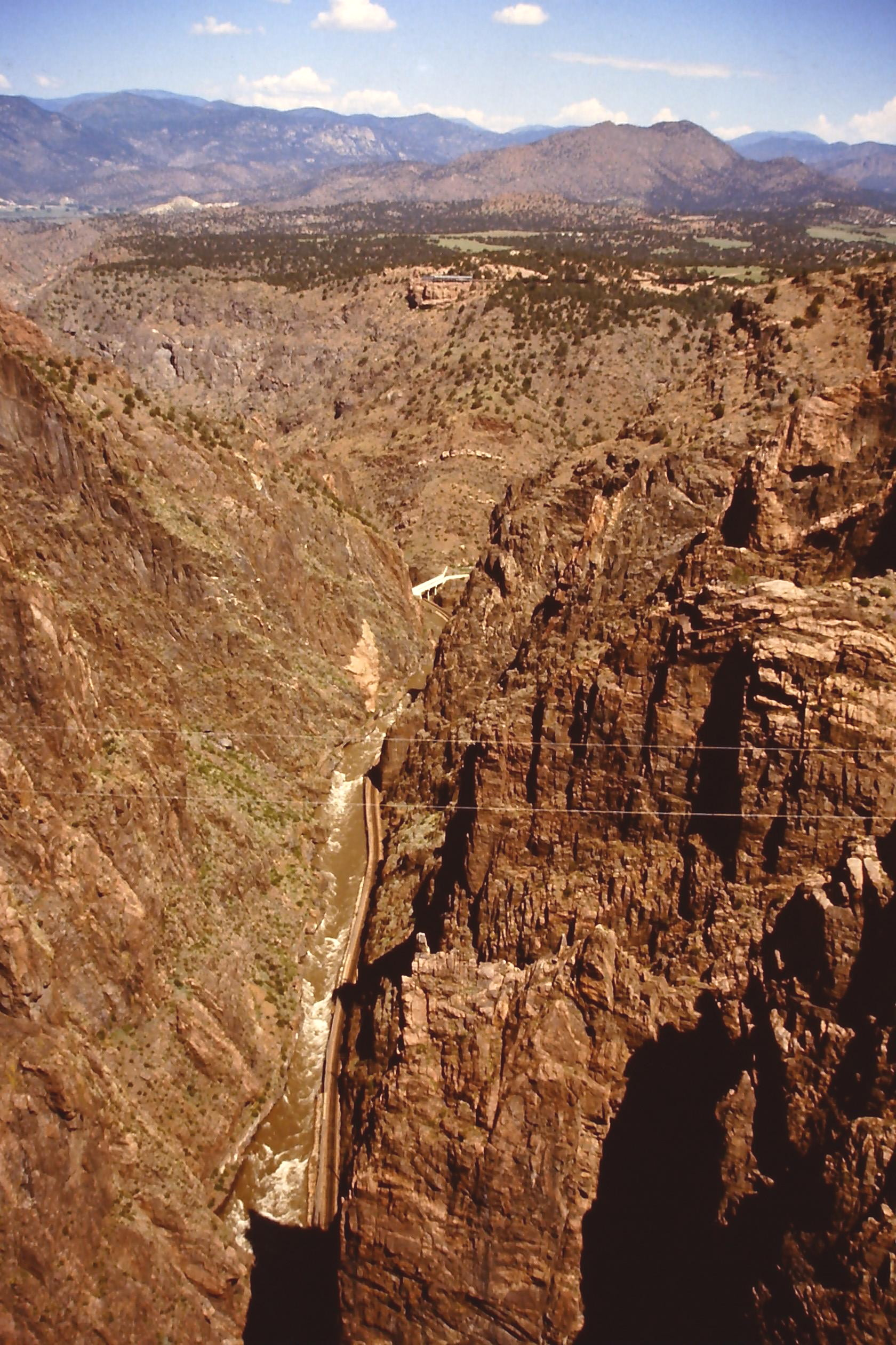 Blick nach Westen in die Königliche Schlucht (Royal Gorge) mit dem Arkansas River